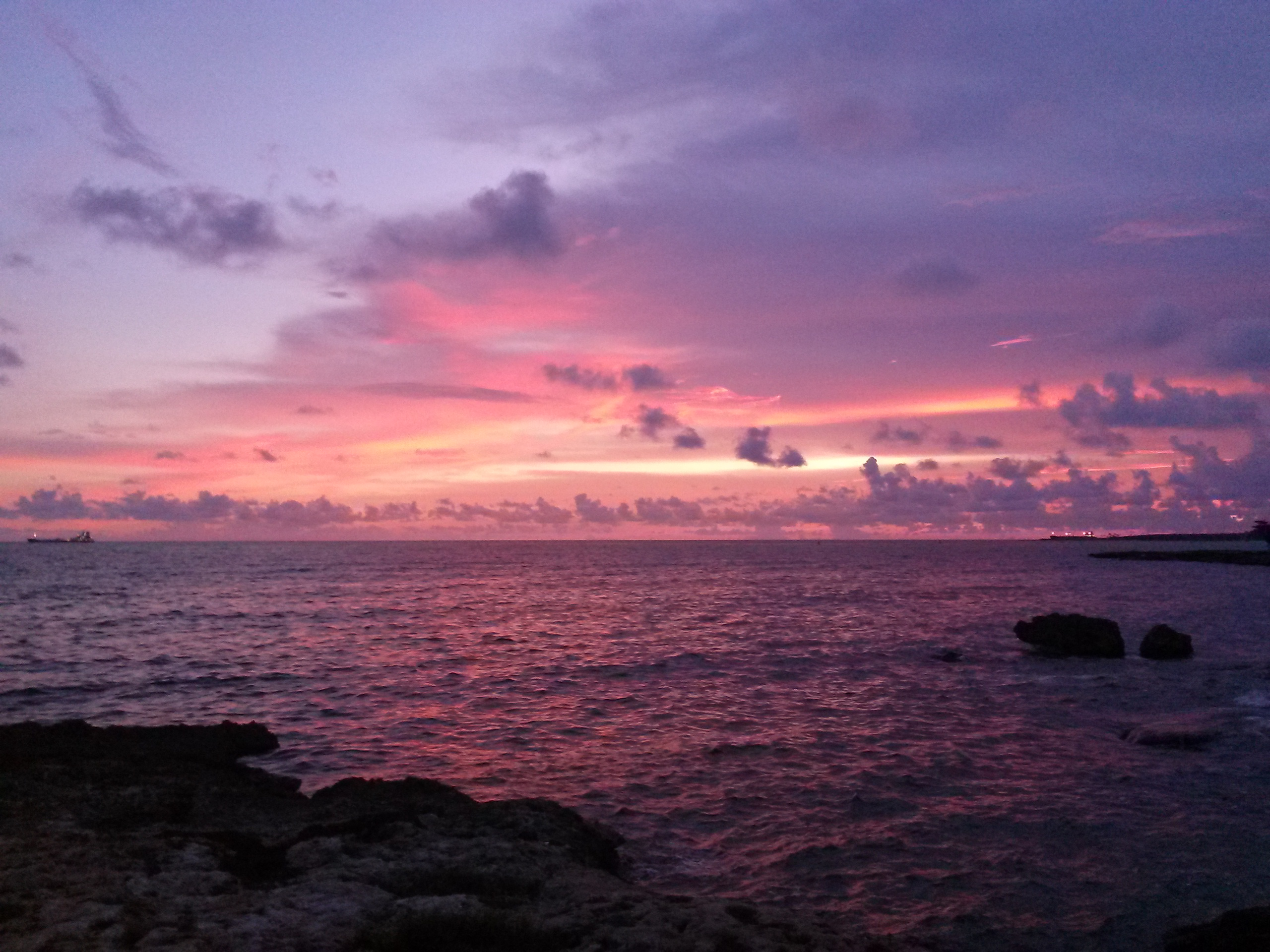 La Ciudad de los Bellos Atardeceres